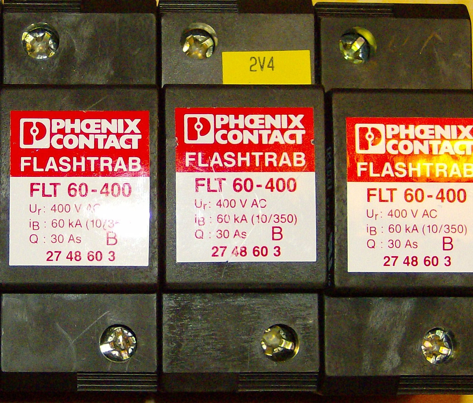 Typ 1 / Class I / B-Ableiter (Blitzstromableiter) mit Arc-Chopping-Funkenstrecke, 1-kanalig